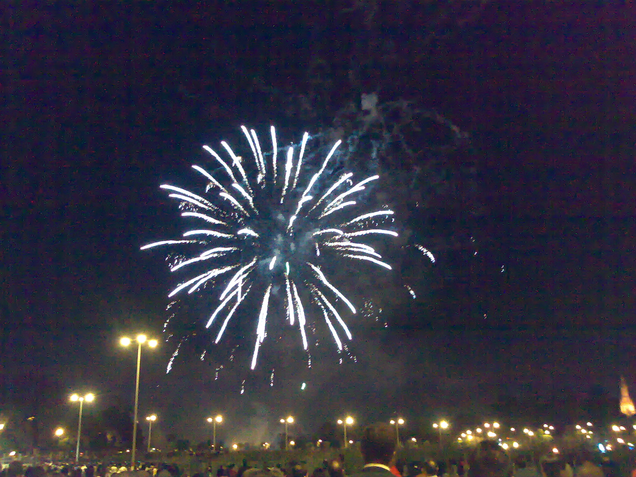 Fuegos artificiales poniendo punto y final a la Feria de abril de Sevilla del año 2007.